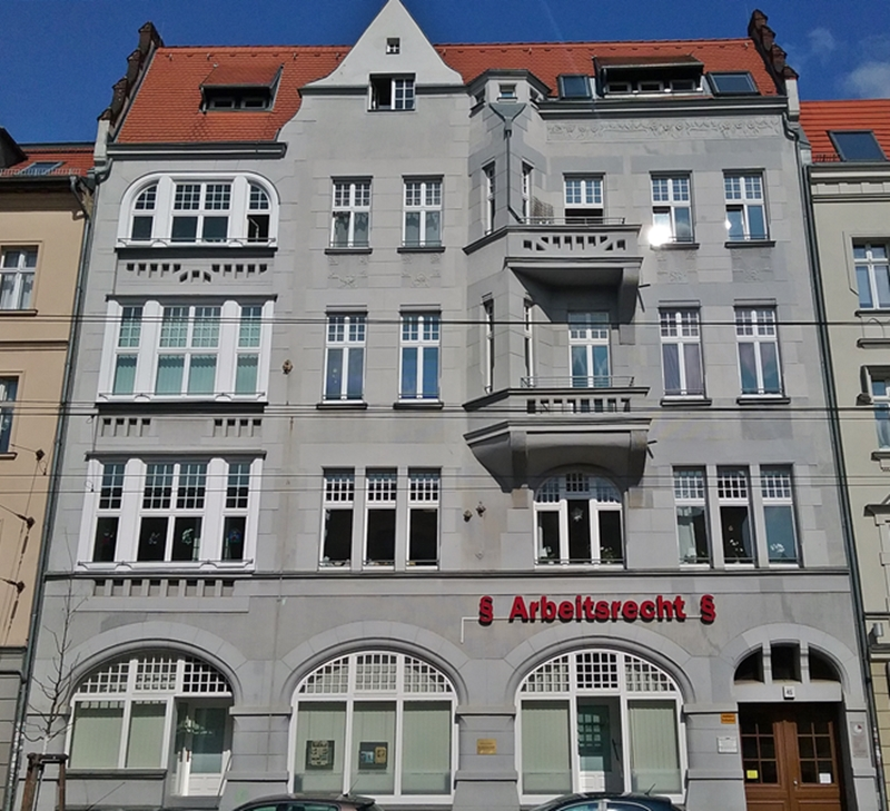 Wohnhaus Wilhelminenhofstraße 46